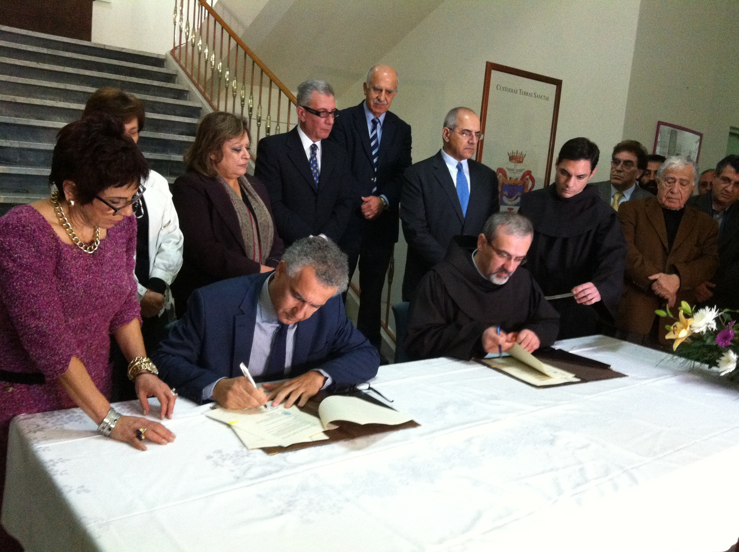 Collegio di Terra Santa. Accordo con Universita di Cipro